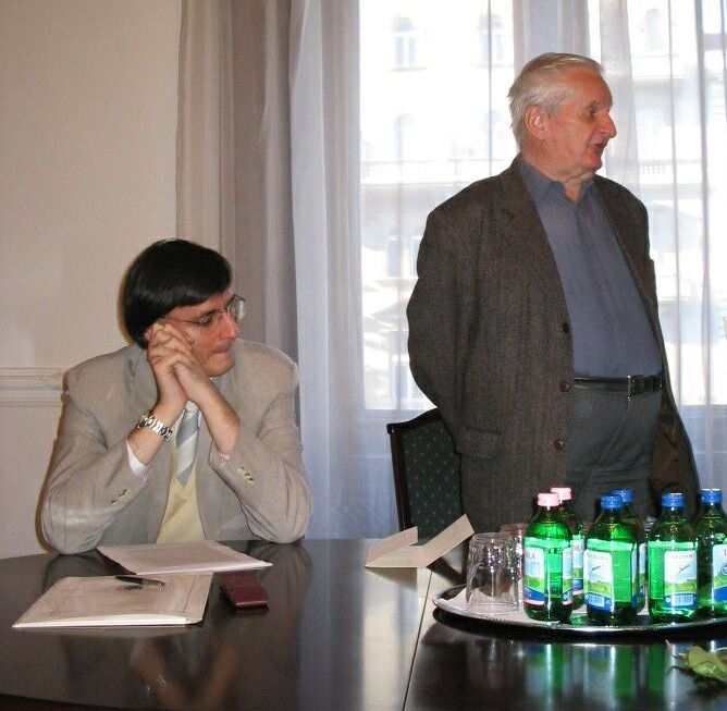 Kecskeméti Gábor (1965–) irodalomtörténész, az MTA BTK Irodalomtudományi Intézet tudományos tanácsadója, intézetigazgatója és Pomogáts Béla (1934–) Széchenyi-díjas magyar kritikus, tanár, irodalomtörténész: Historia litteraria a XVIII. században